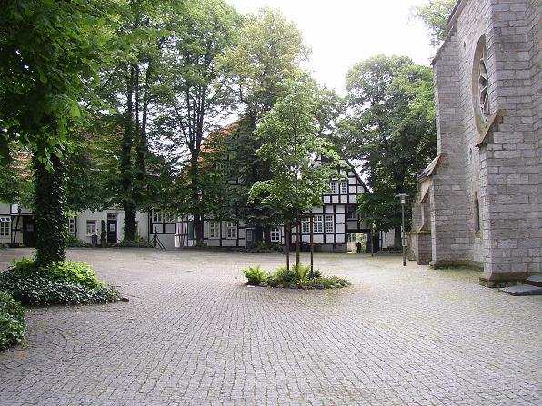 Halle (Westf) - Haller Herz